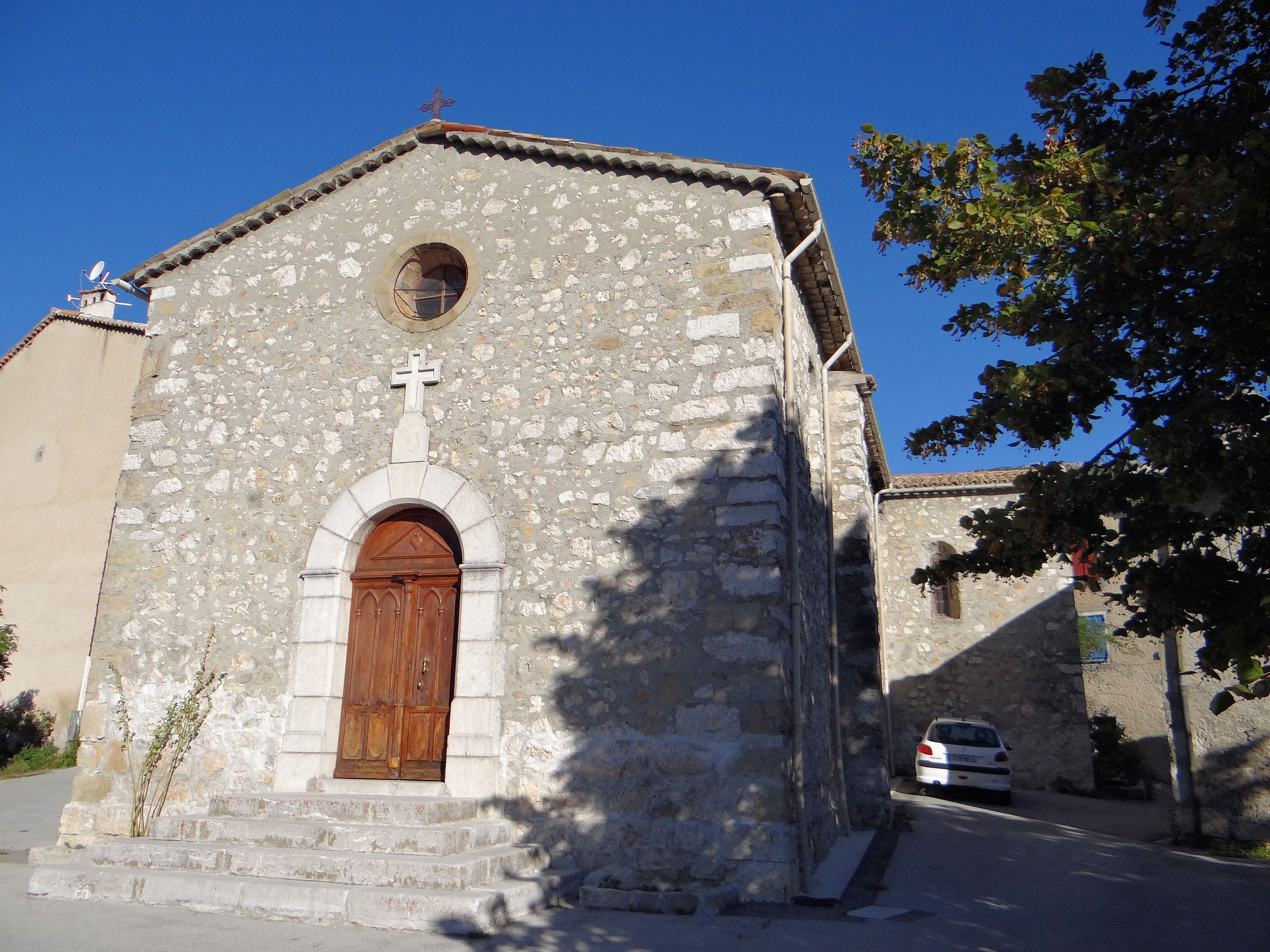 Soleilhas - L'église paroissiale